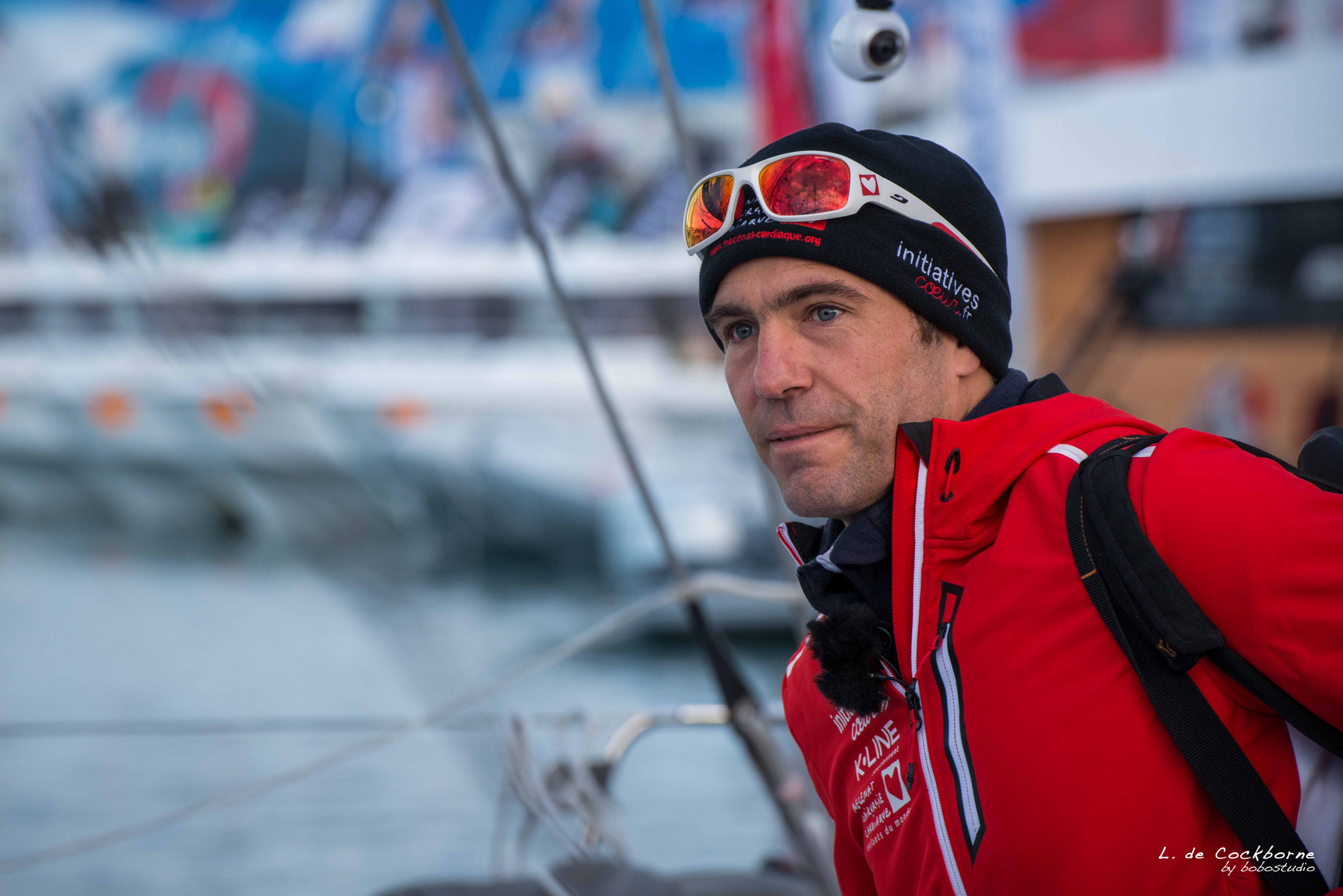 Reportage Vendée Globe 2016